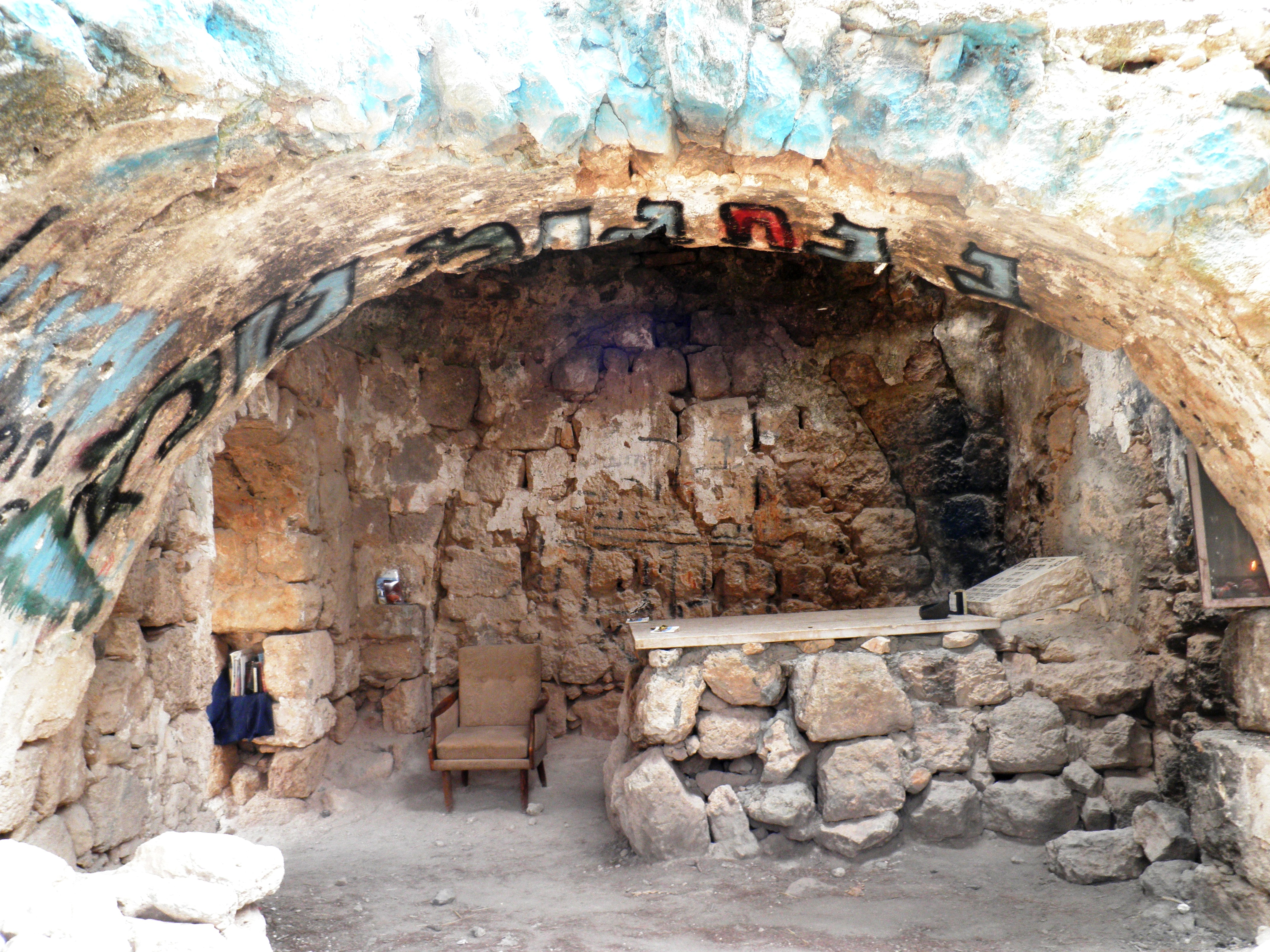 קבר מתיתיהו בן יוחנן כהן גדול